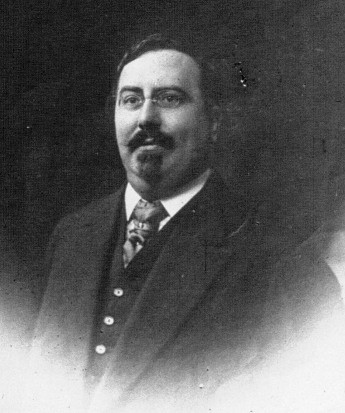 Gustave Téry, directeur de L’Œuvre : portrait d'identité.